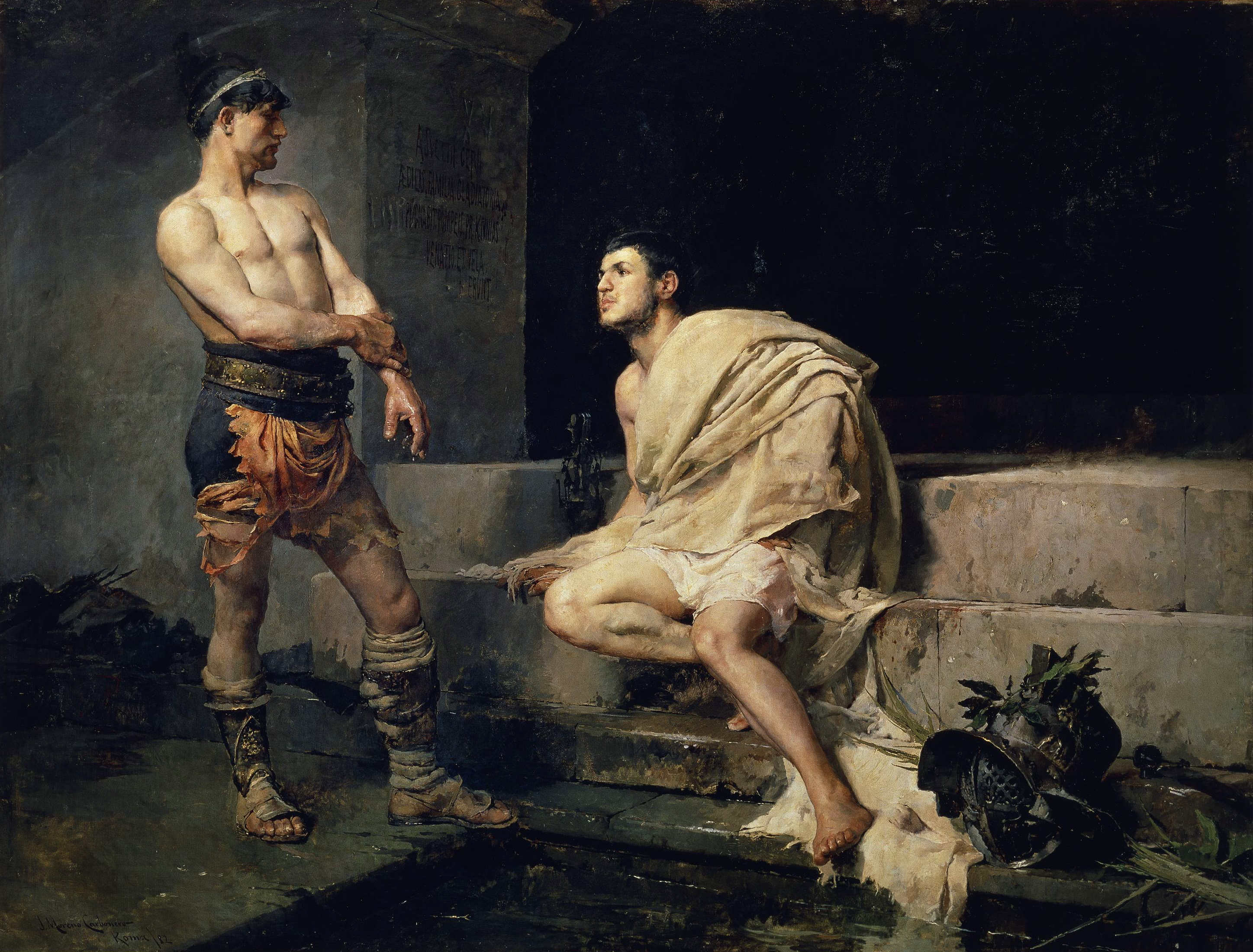 Se trata de una obra enviada por el artista en su primer año de pensionado en Roma, donde participó en la exposición. Se mostró en la Sección de Pensionados en Roma de la Exposición Nacional de Bellas Artes de 1884. La inscripción que se encuentra sobre el intradós del pilar alude al oficio de los protagonistas de la escena, se traduce de la siguiente forma: "La compañía de gladiadores del edil A. Suetio Certo combatirá en Pompeya el 31 de mayo. Habrá caza y toldos".